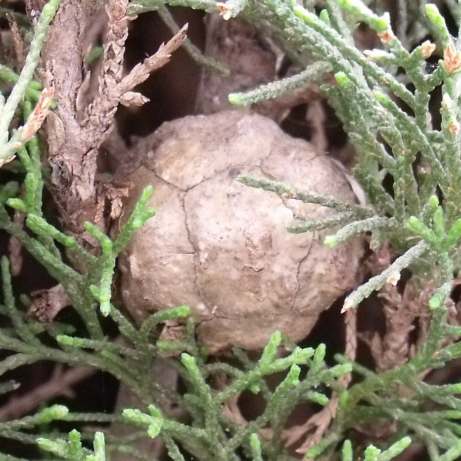 Cono de un ciprés Cupressus sempervirens.